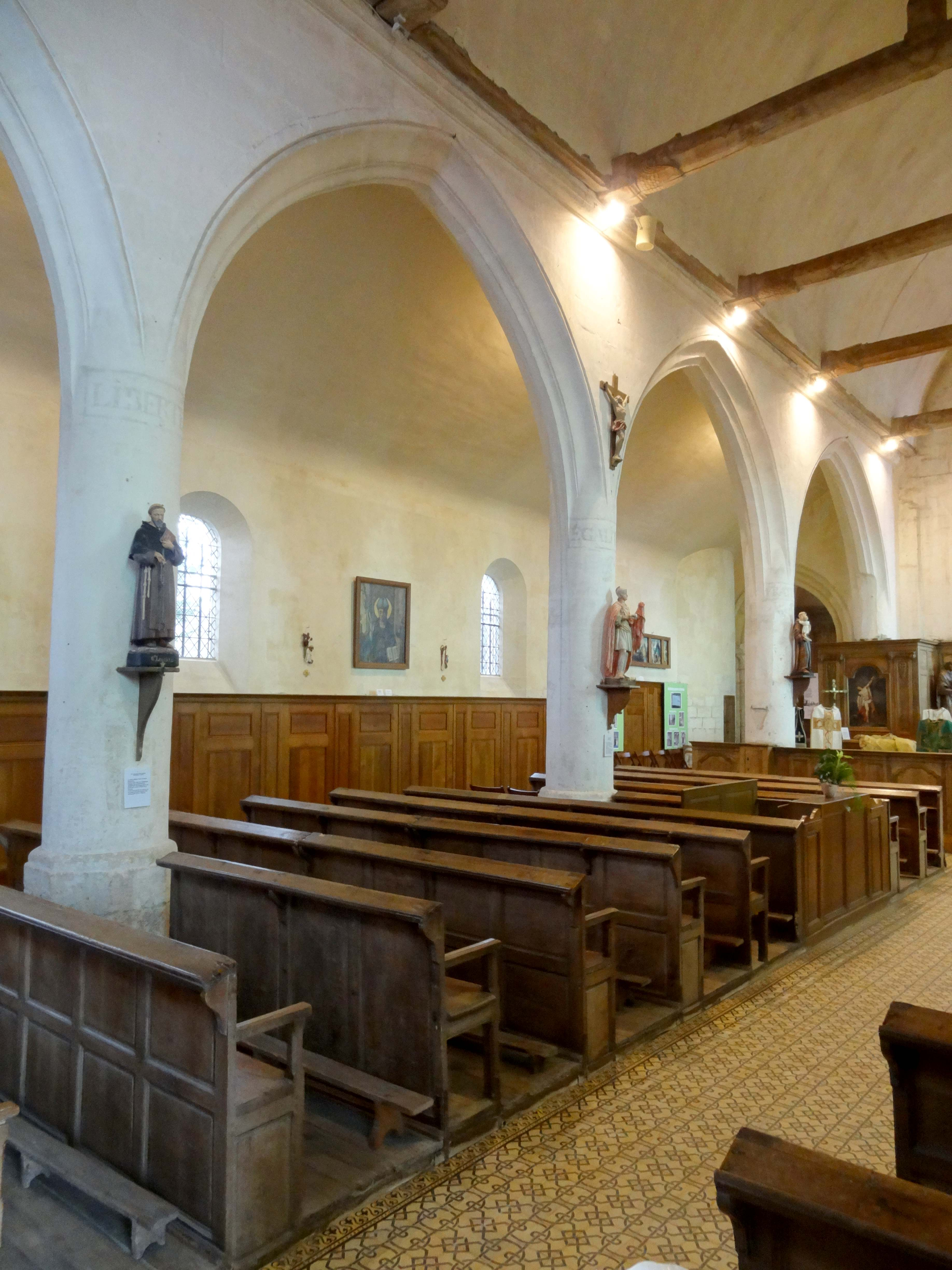 Intérieur de l'église - voir titre.